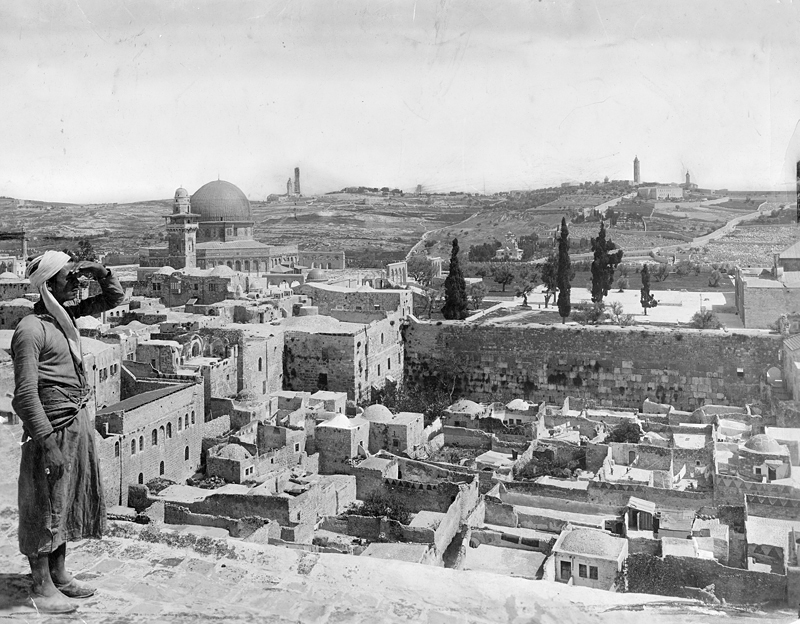 Jerusalem, 1917.